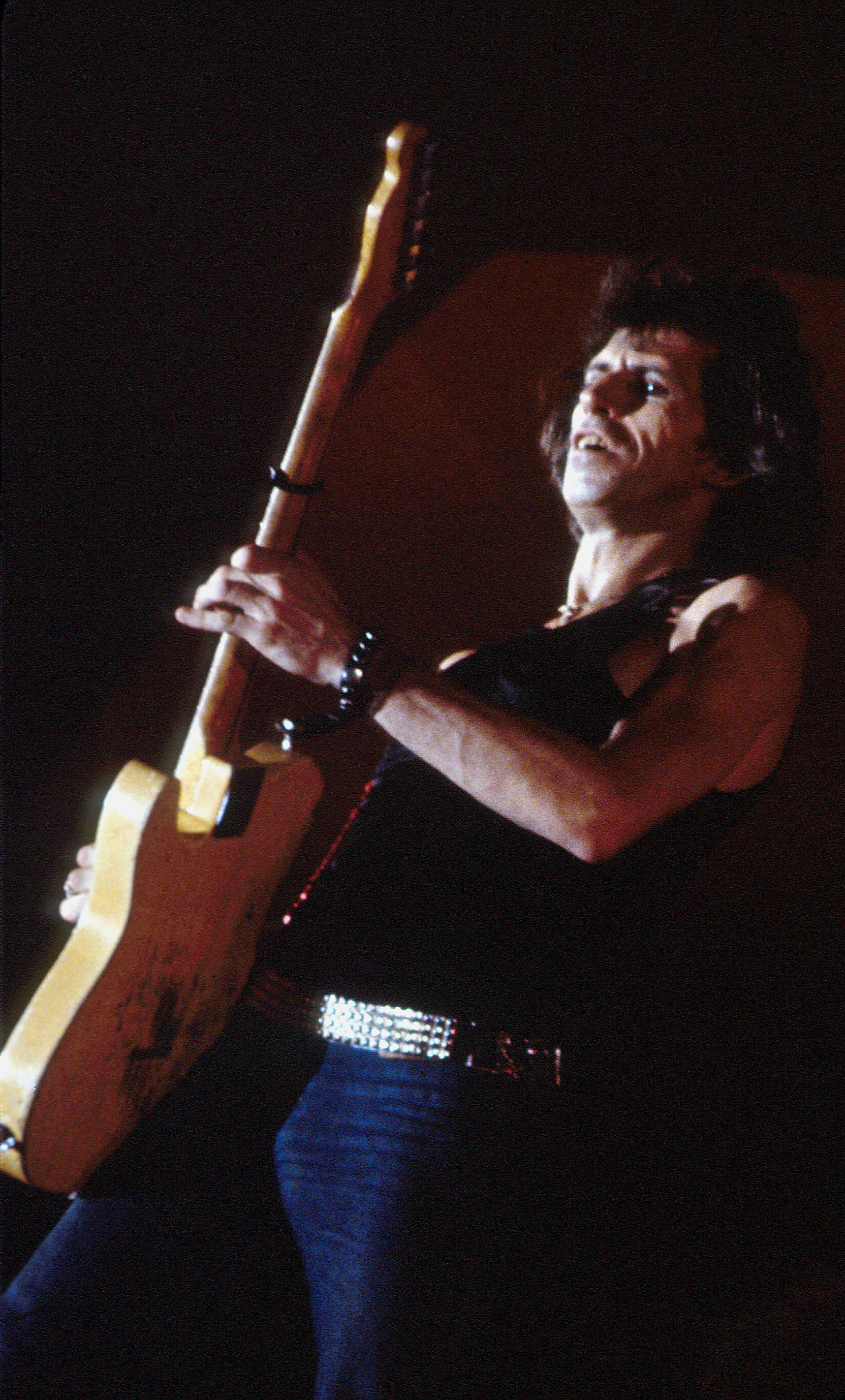 Concerto dei Rolling Stones a Torino, 1982, Keith Richards